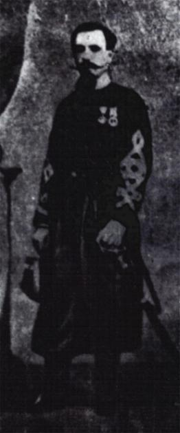 Generale Josè Borjes, copyright scaduto